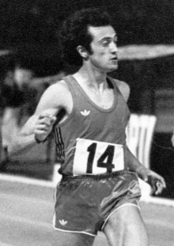 Pietro Mennea in a race in Viareggio, Italy in 1972